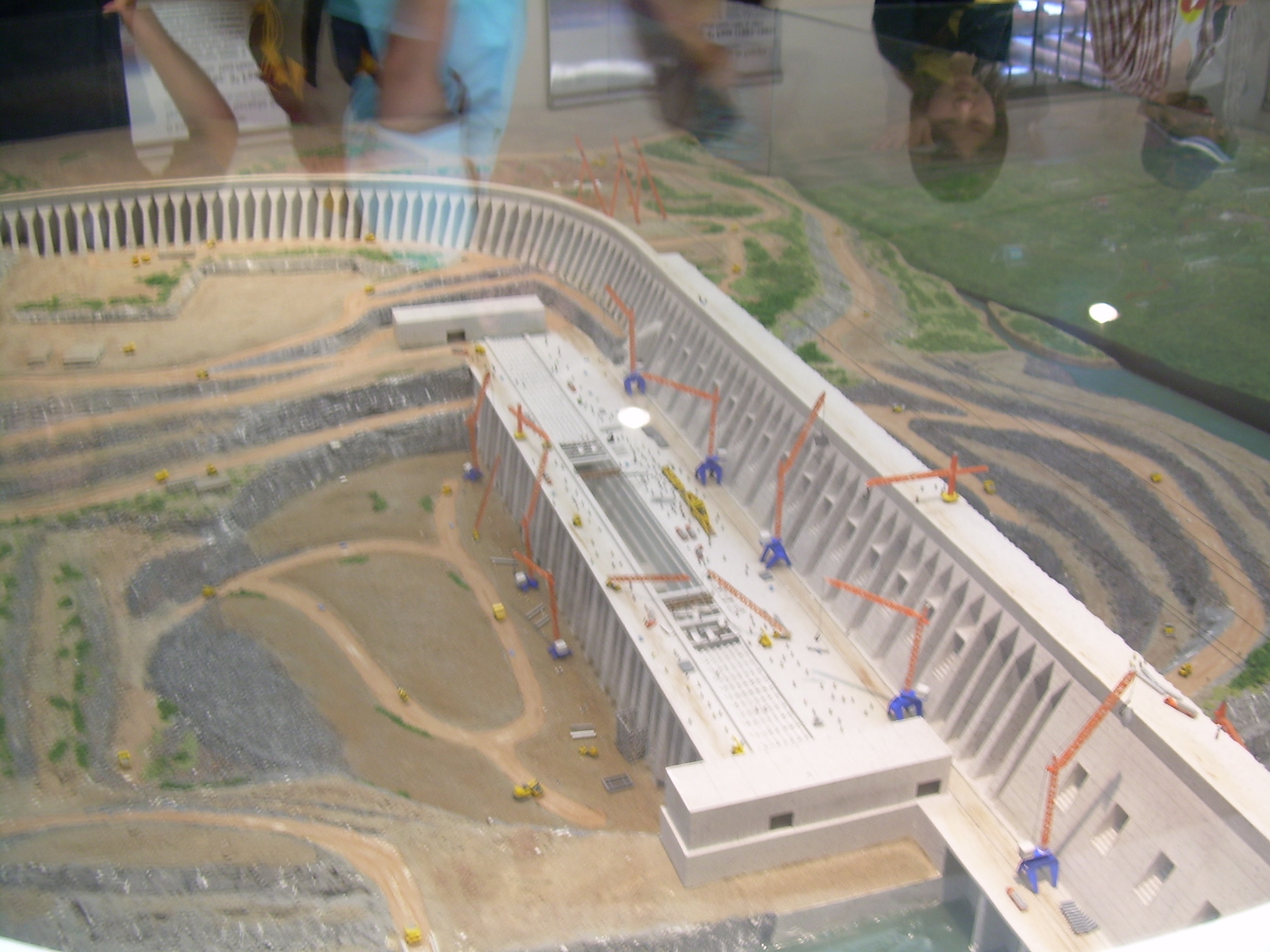 Itaipu